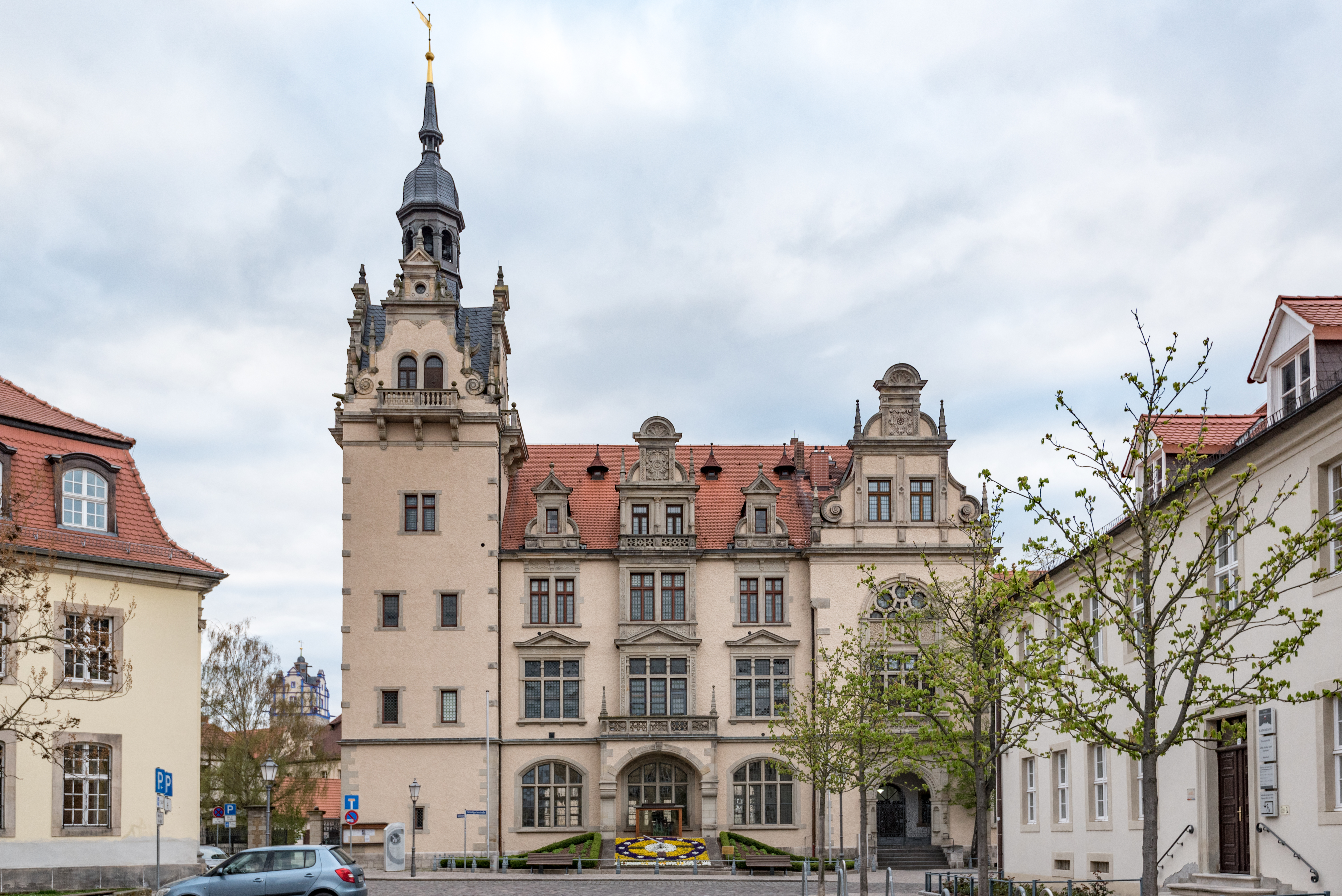 Bernburg (Saale), Schlosssgartenstraße 16